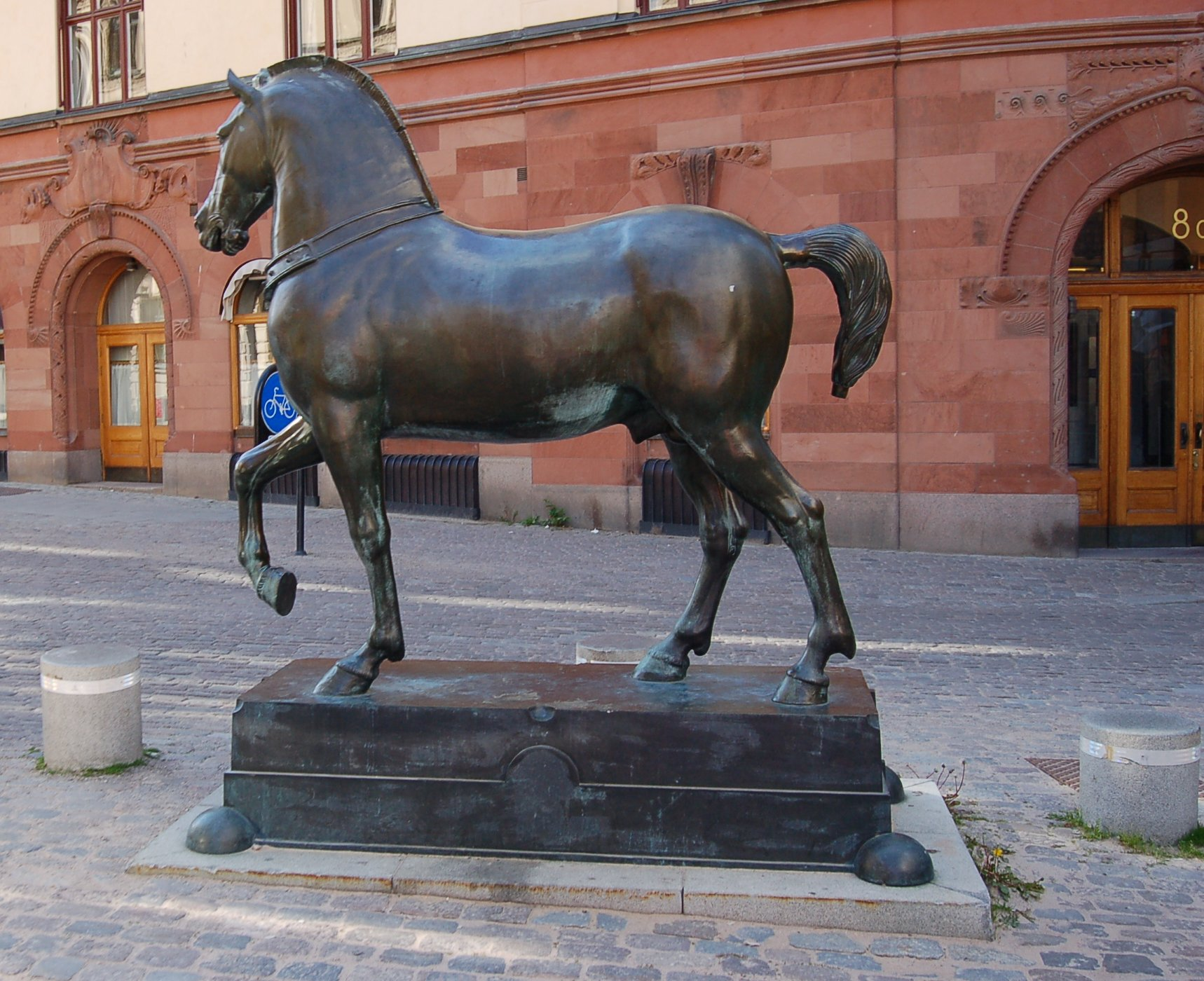 Den norra bronshästen på Blasieholmstorg i Stockholm.